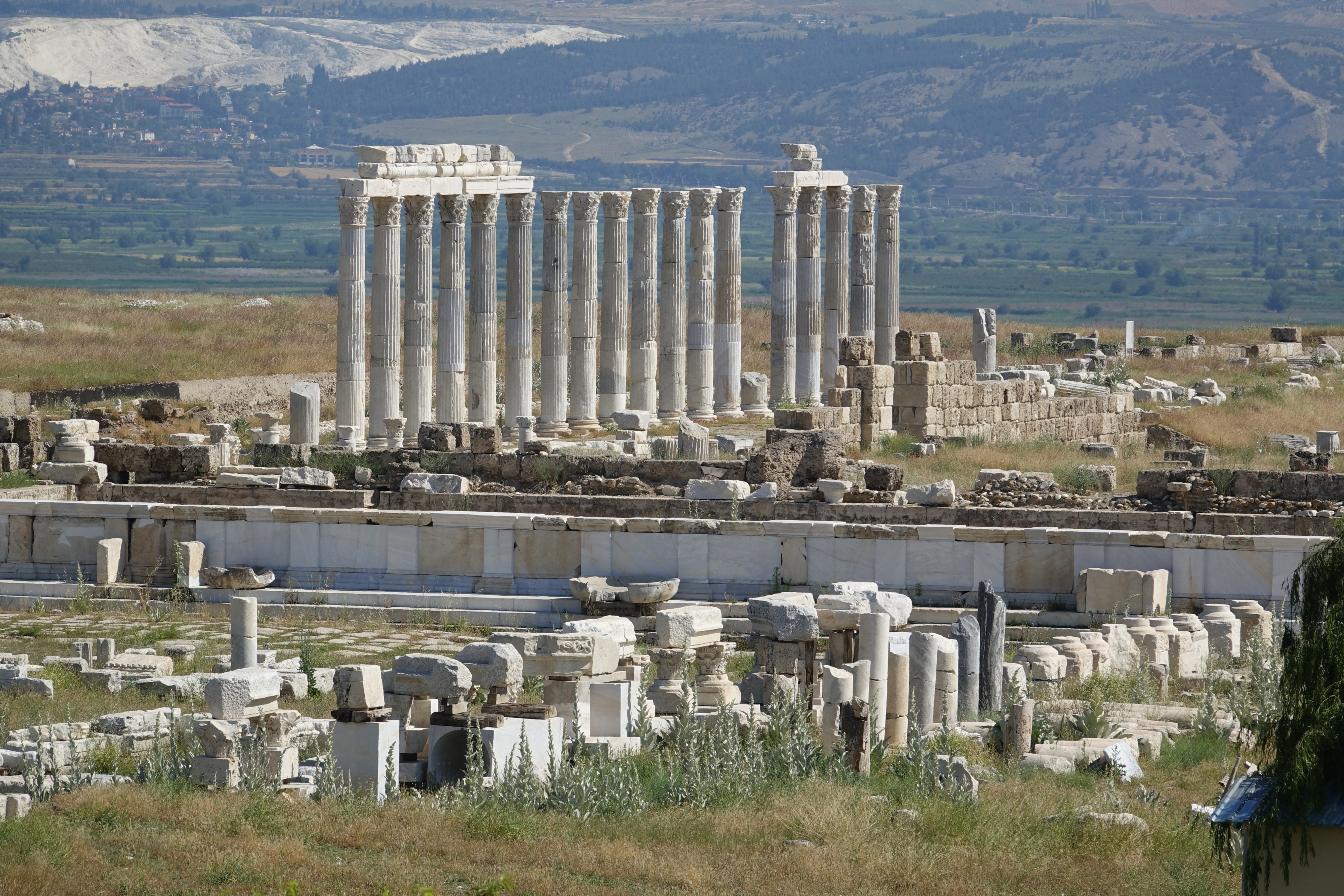 Blick auf erhaltene Säulen im Tempelbezirk, im Hintergrund Pammukale